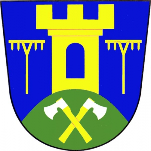 Znak, Hoštejn, okres Šumperk